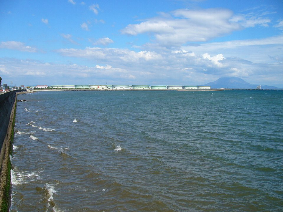 新日本石油 喜入原油基地 左の道路は国道226号、右奥は桜島